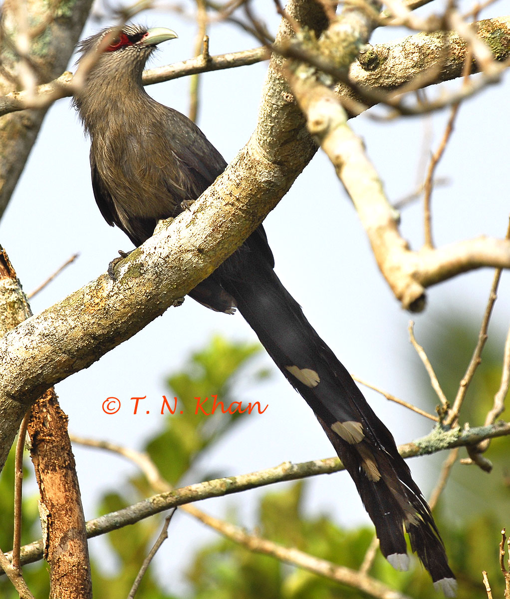 Green-billed Malkoha